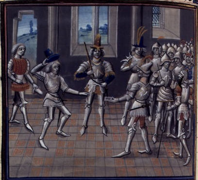 Alexios I. KOmnenos a Hugo I. z Vermandois